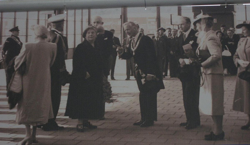 In 1939 opende Koningin Wilhelmina het Amstel Station